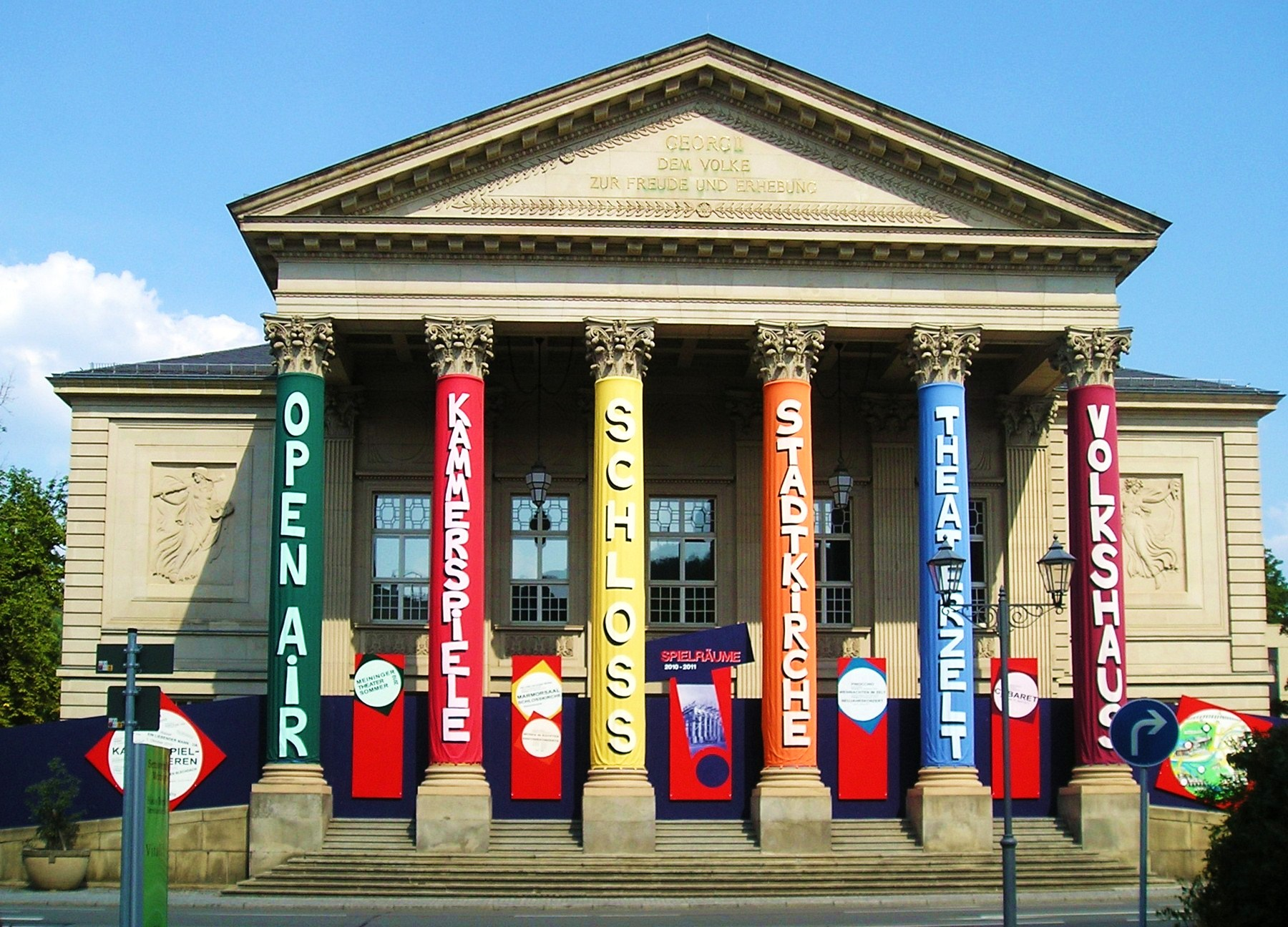 Das Meininger Theater - während der Generalsanierung 2010/11 macht das Theater auf diese originelle Weise auf die Ausweichspielplätze aufmerksam.